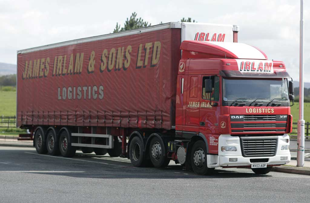 irlam